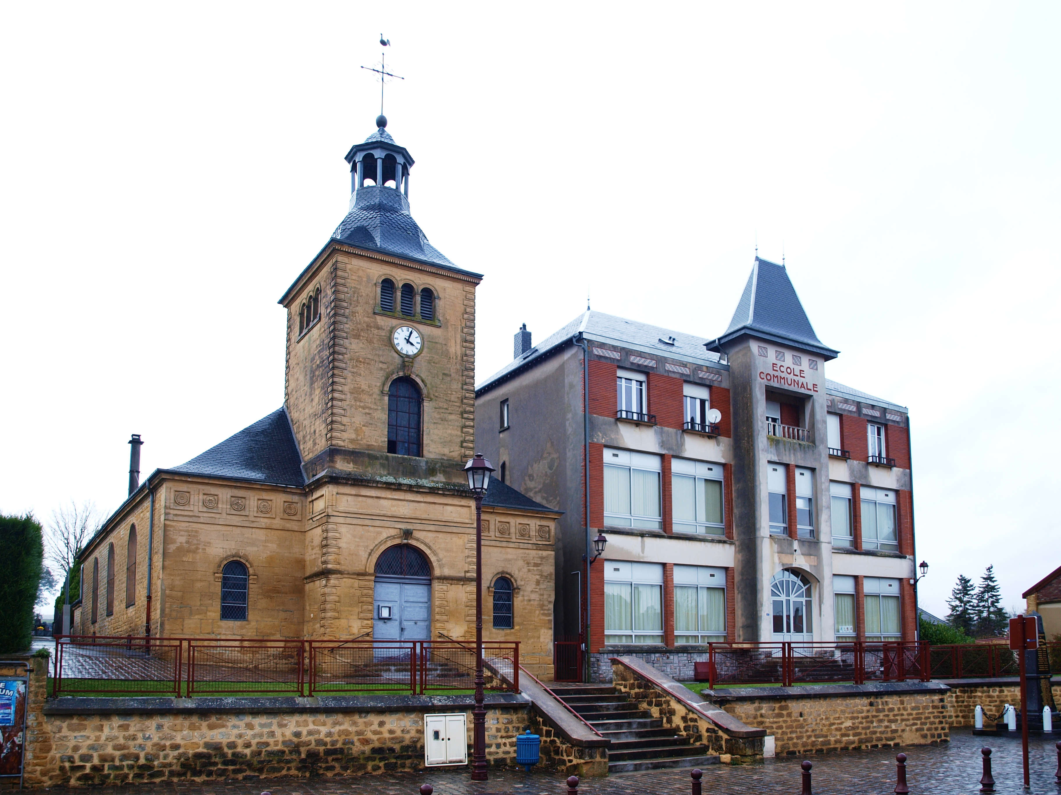 La Francheville (Ardennes, France) ; l'école primaire & l'église.